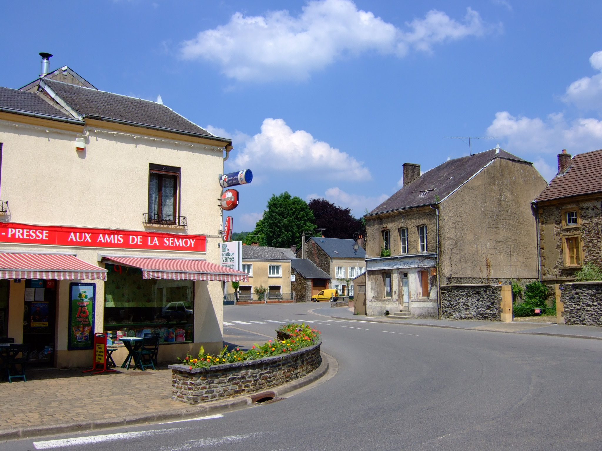 Thilay (Ardennes, France).